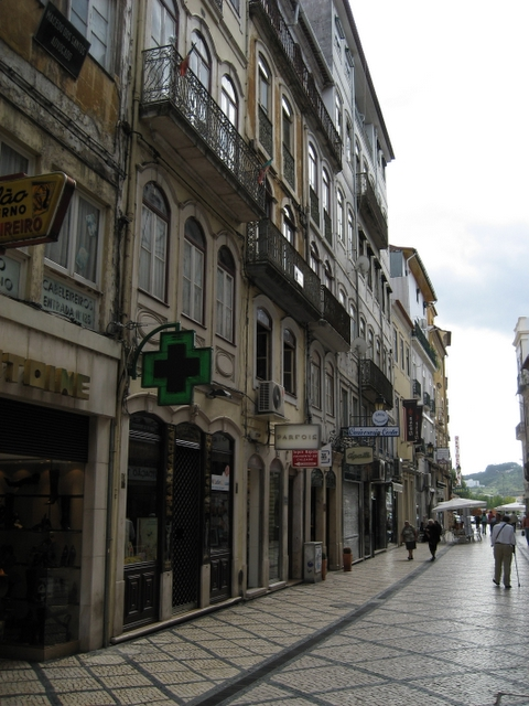 Coimbra Downtown da çektiğim bir resim.